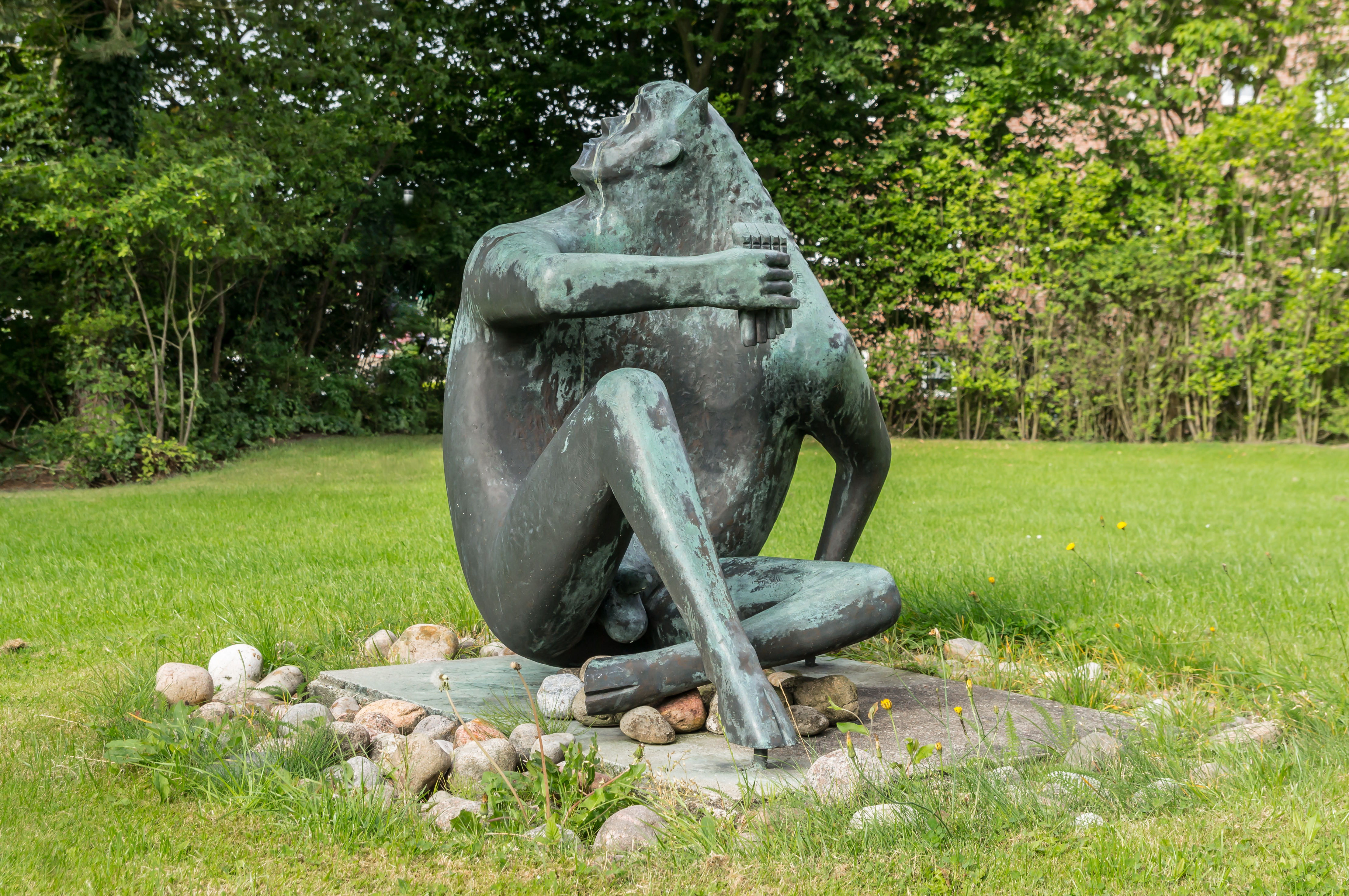 Flensburg-Fruerlund, Fichtestraße 3, Skulptur mit dem Titel "Pan" von Fritz During aud dem Jahr 1971.; Die Fichtestraße liegt neben bzw. nahe der Straße Finisberg